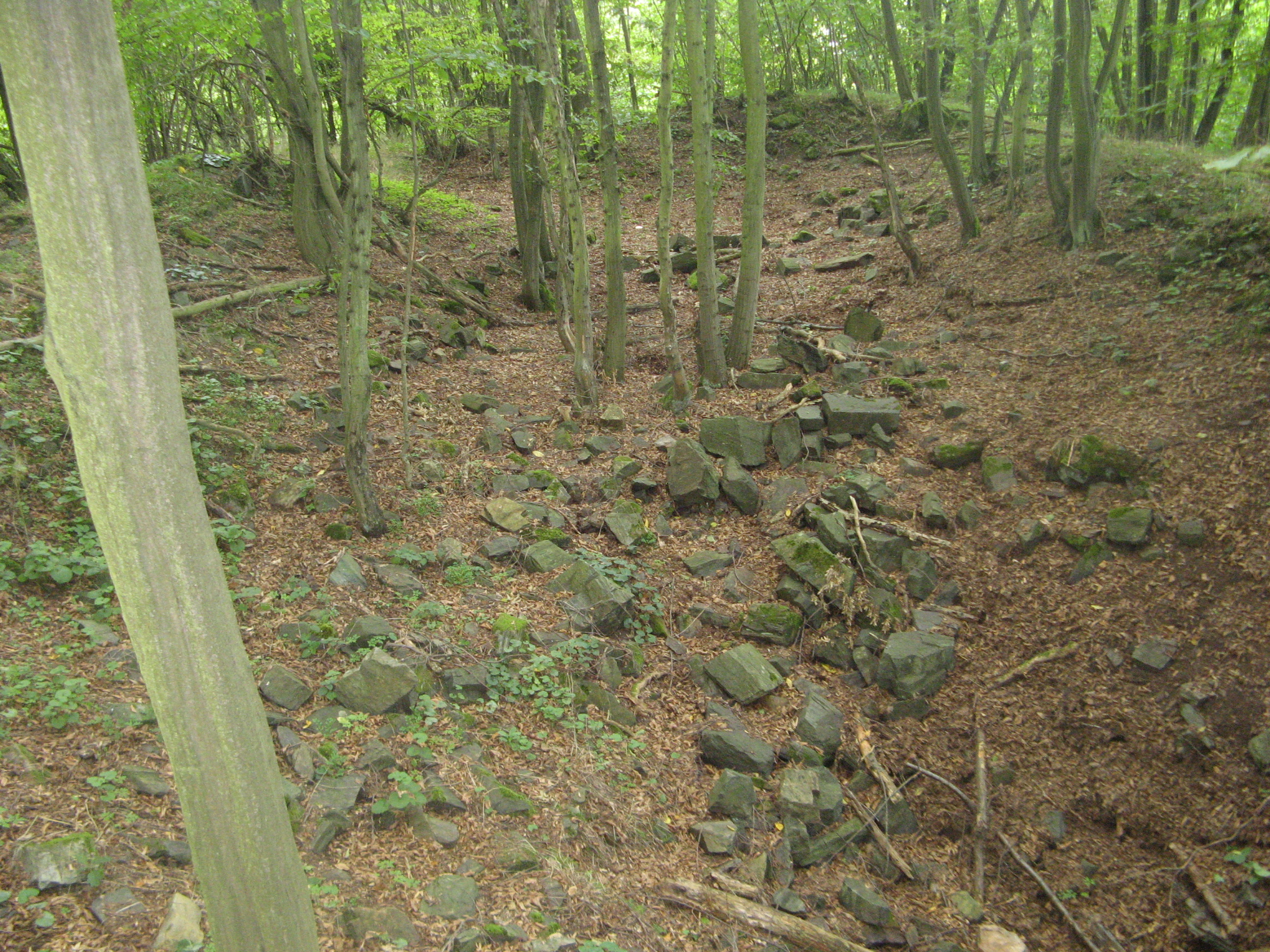 Zřícenina hradu Ostromeč, obec Radíč